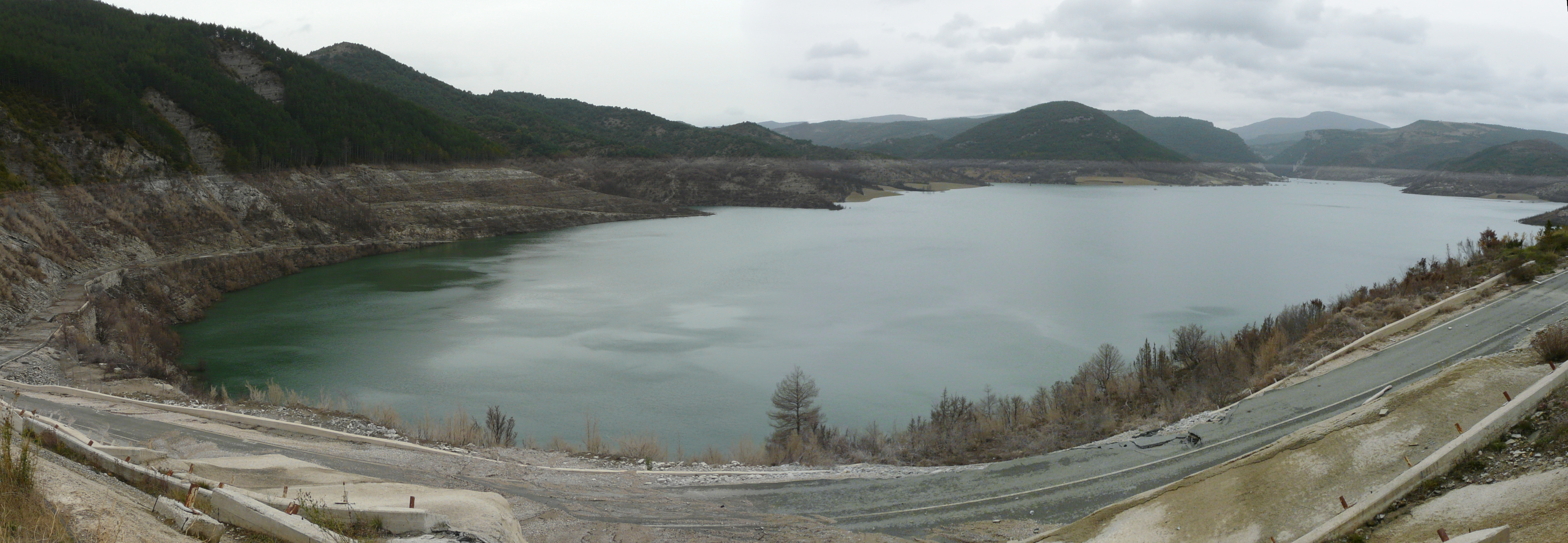 Itoizko urtegiaren ikuspegia